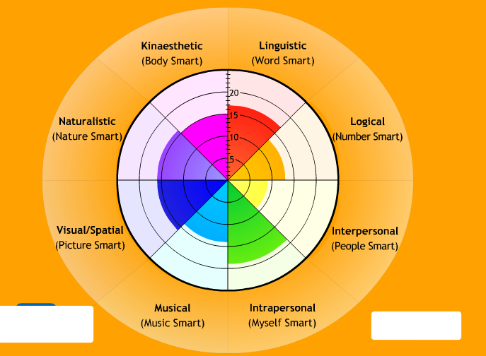 Mostra de manera gràfica els diversos tipus d'intel·ligènciesEuskara: Hainbat adimen mota bereizteko grafikoa